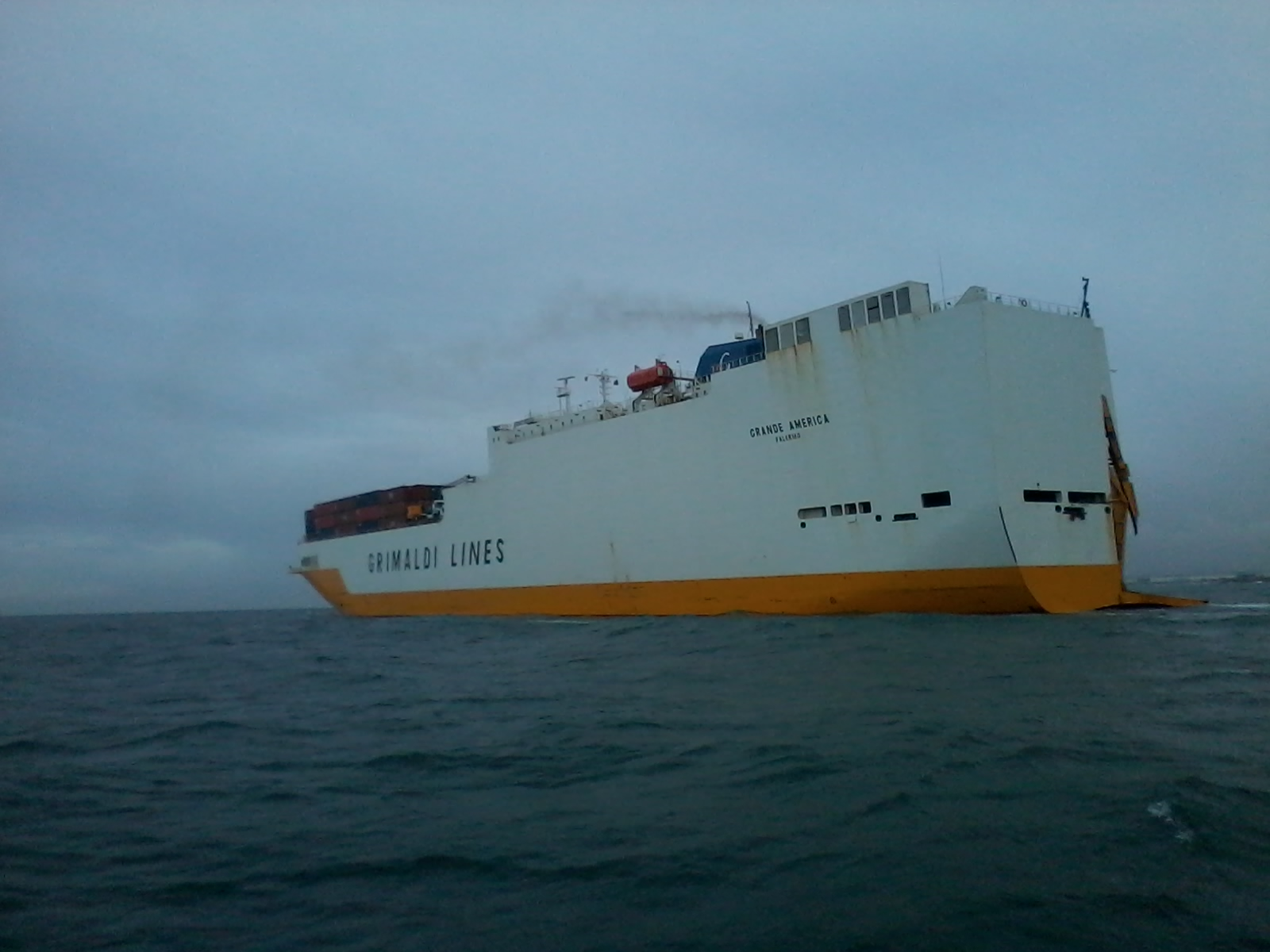 Car carrier GRANDE AMERICA naviguant en mer de Casablanca . Casablanca - Morocco - IMO: 9130937 Pavillon: Italy Genre d'un navire: Cargo Année de Construction: 1997